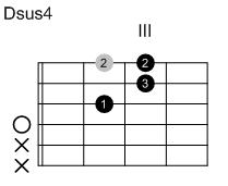 Eigenanfertigung